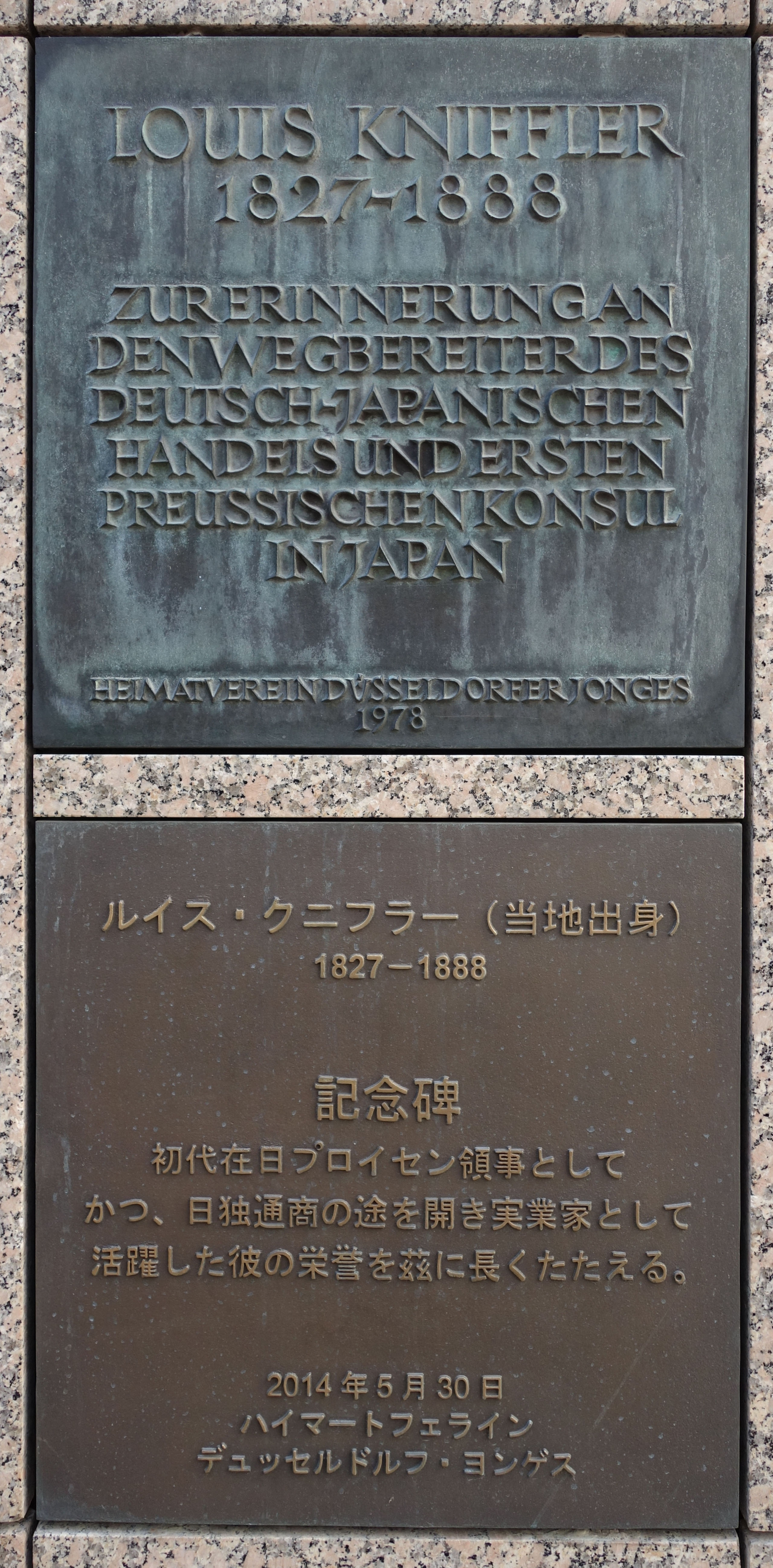 Louis Kniffler (1827-1888). Zur Erinnerung an den Wegbereiter des Deutsch-Japanischen Handels und ersten preussischen Konsul. Heimatverein Düsseldorfer Jongens. Auf dem Innenhof des Deutsch-Japanischen Centers an der Immermannstraße/Hotel Nikko. 2 Tafeln, deutsch und japanisch. Eine weitere Gedenktafel befindet sich vor dem Haus Goltsteinstraße Nr. 15.